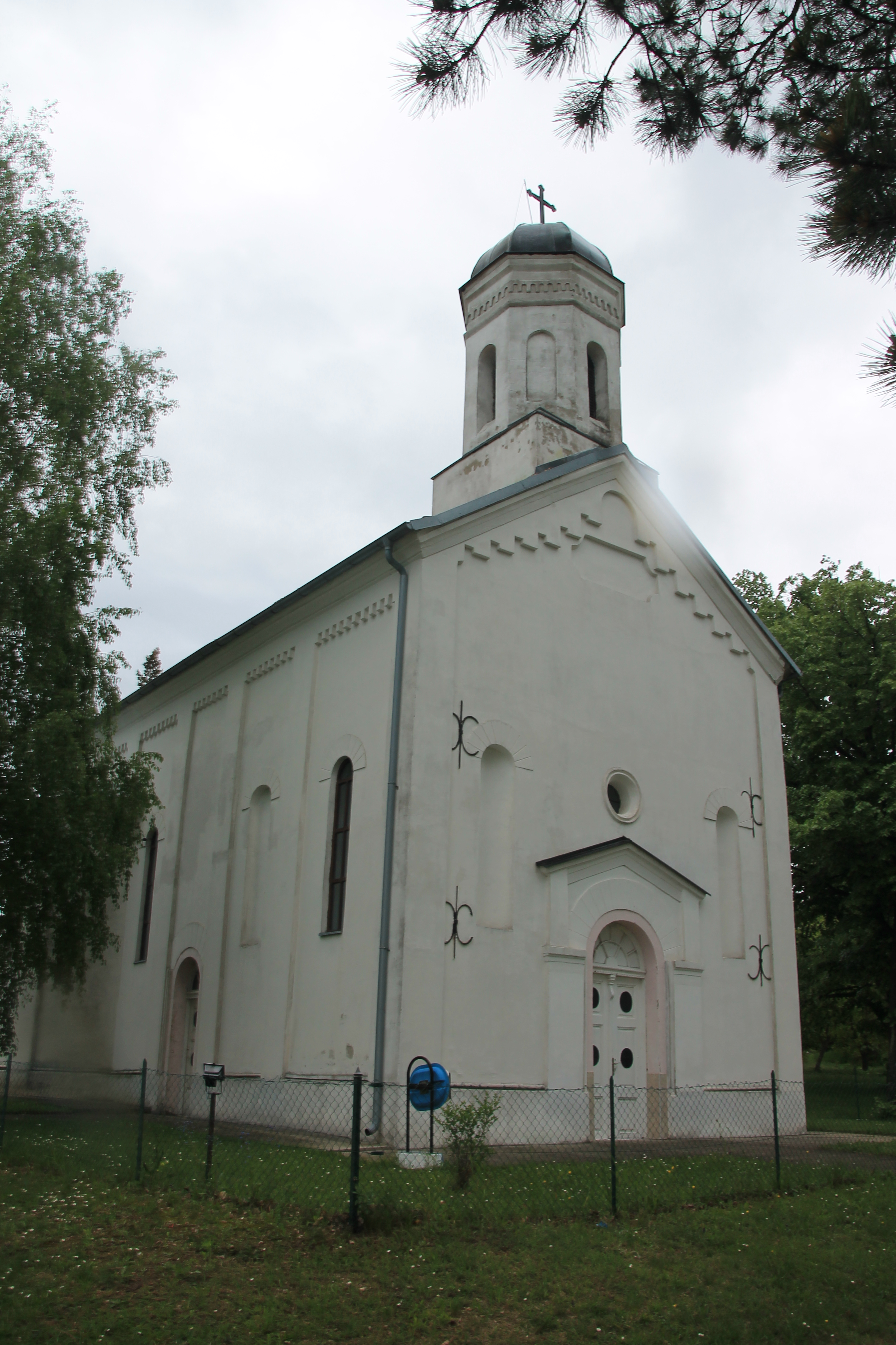 Crkva Sv. Prokopija (Ovsište)